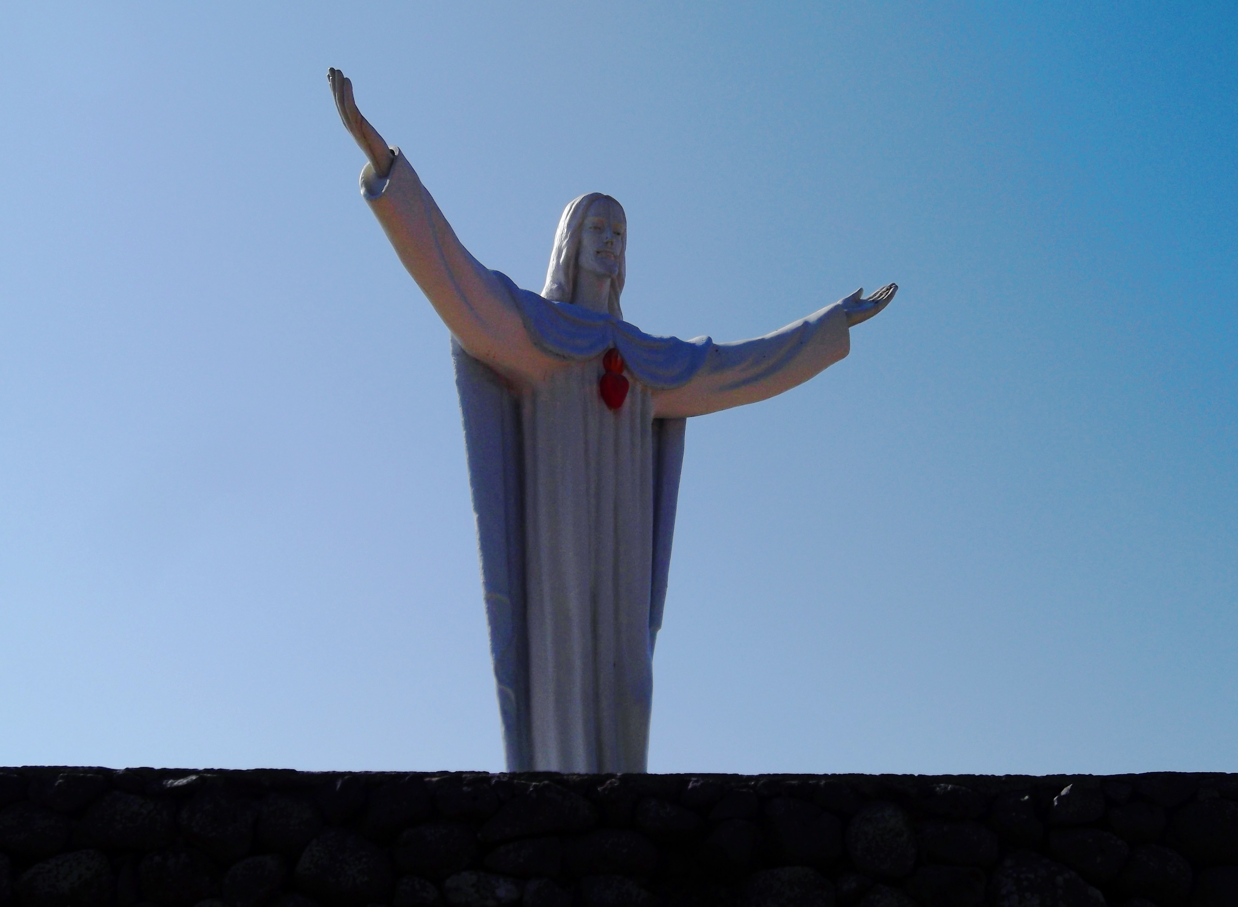 Statua dell'artista Edgardo Mugnoz nella terrazza panoramica di Santu Lussurgiu.